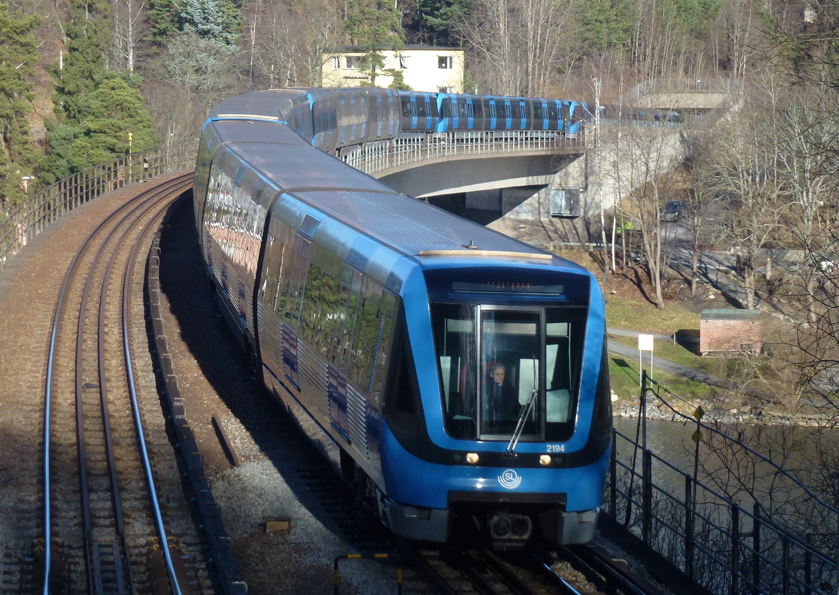 Stocksundsbroarna tunnelbana